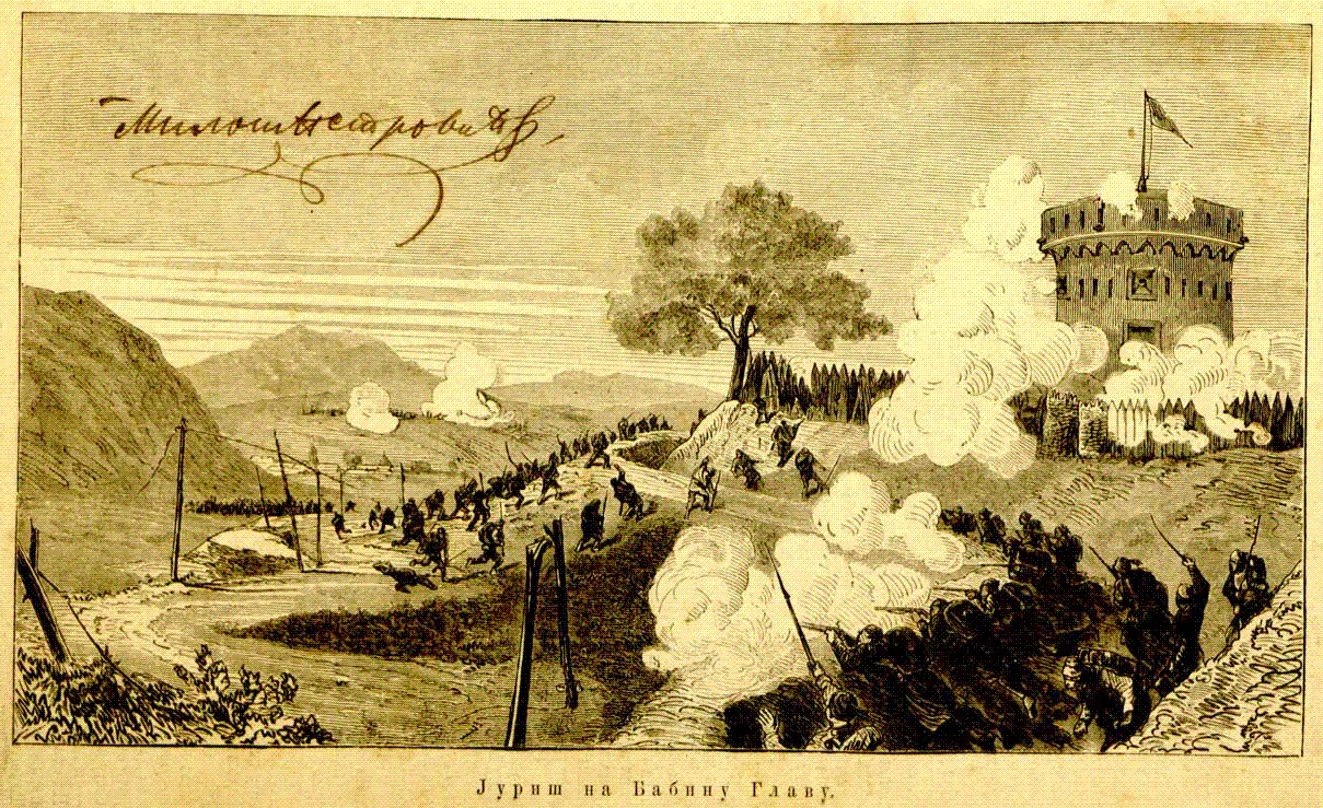 Angriff auf Babina glava